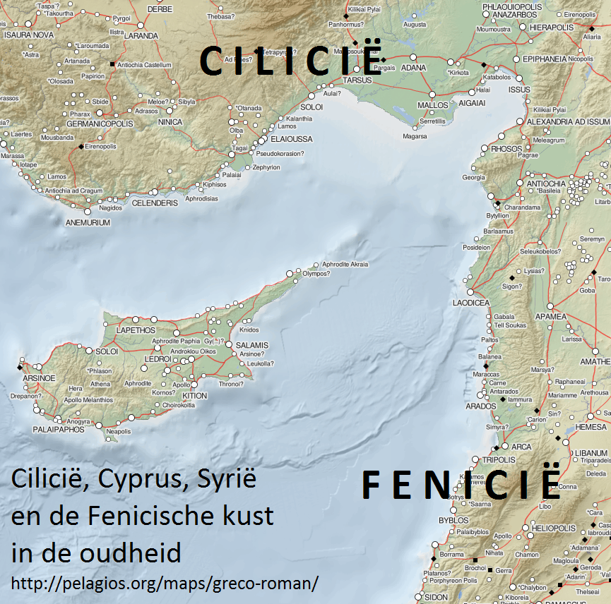 Gebaseerd op